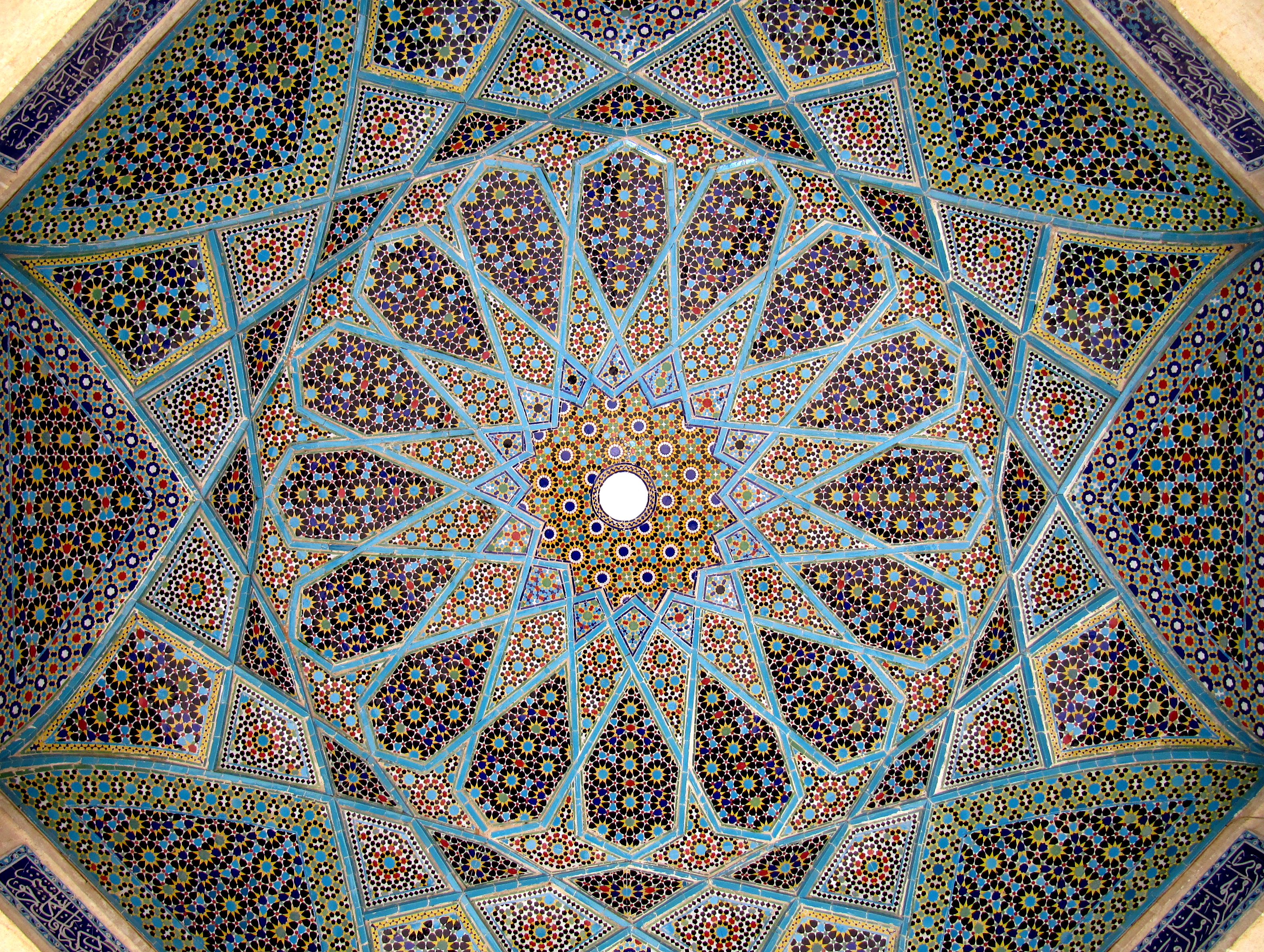 آرامگاه خواجه شمس الدین محمد حافظ